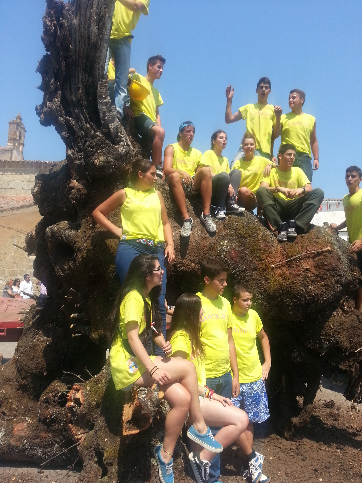 Tuero: Tronco seco de un arból y Quintos (los que tendrían edad para ir al ejercito cuando era obligatorio) 2013.